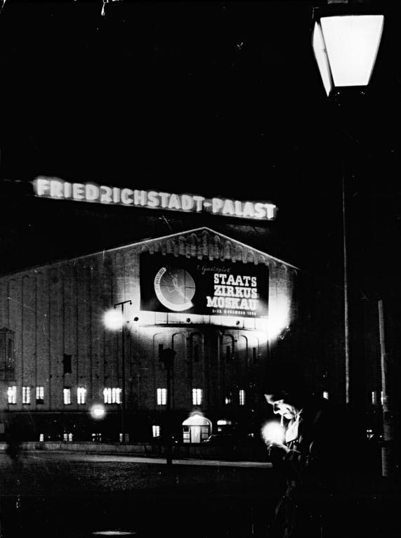 Berlin, Friedrichstadt-Palast, Nacht Zentralbild Ulmer-Quaschinsky. 10.11.1956 Zum Gastspiel des Moskauer Staatszirkus in Berlin Nachtaufnahme vor dem Berliner Friedrichstadt-Palast-Varietés, in welchem das Gastspiel stattfindet.